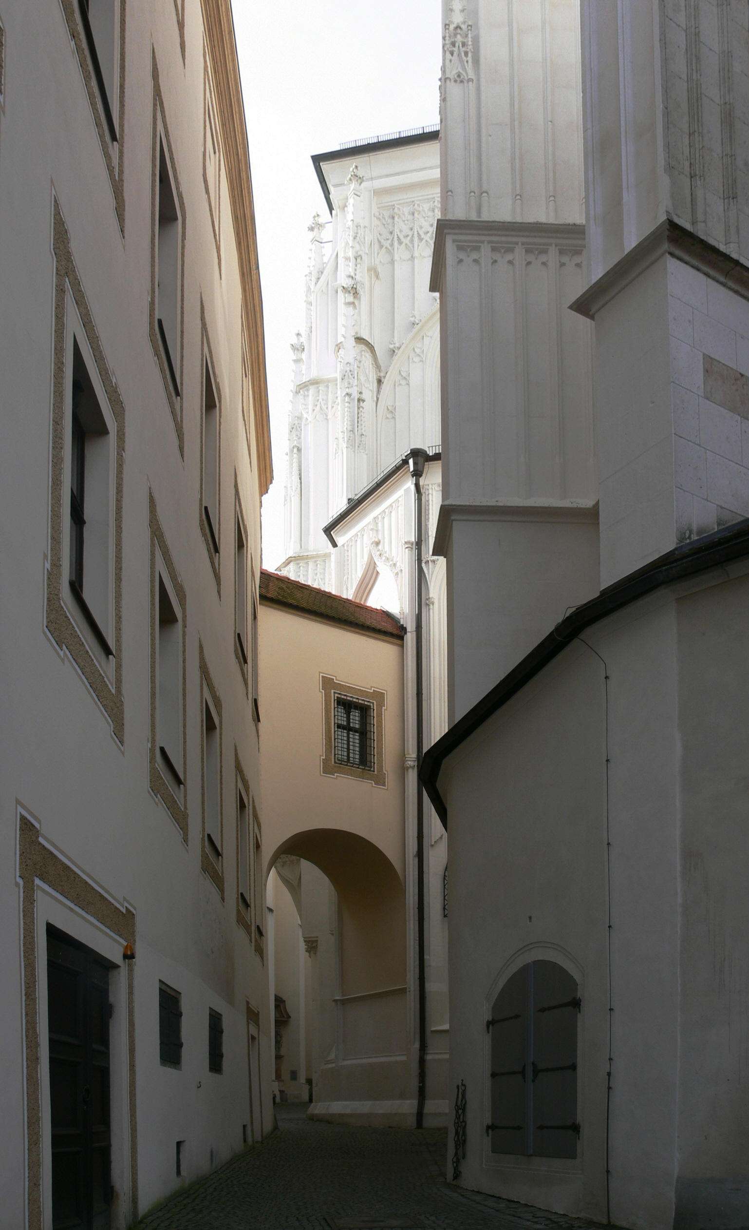 Passau, Zengergasse (rechts der Dom)